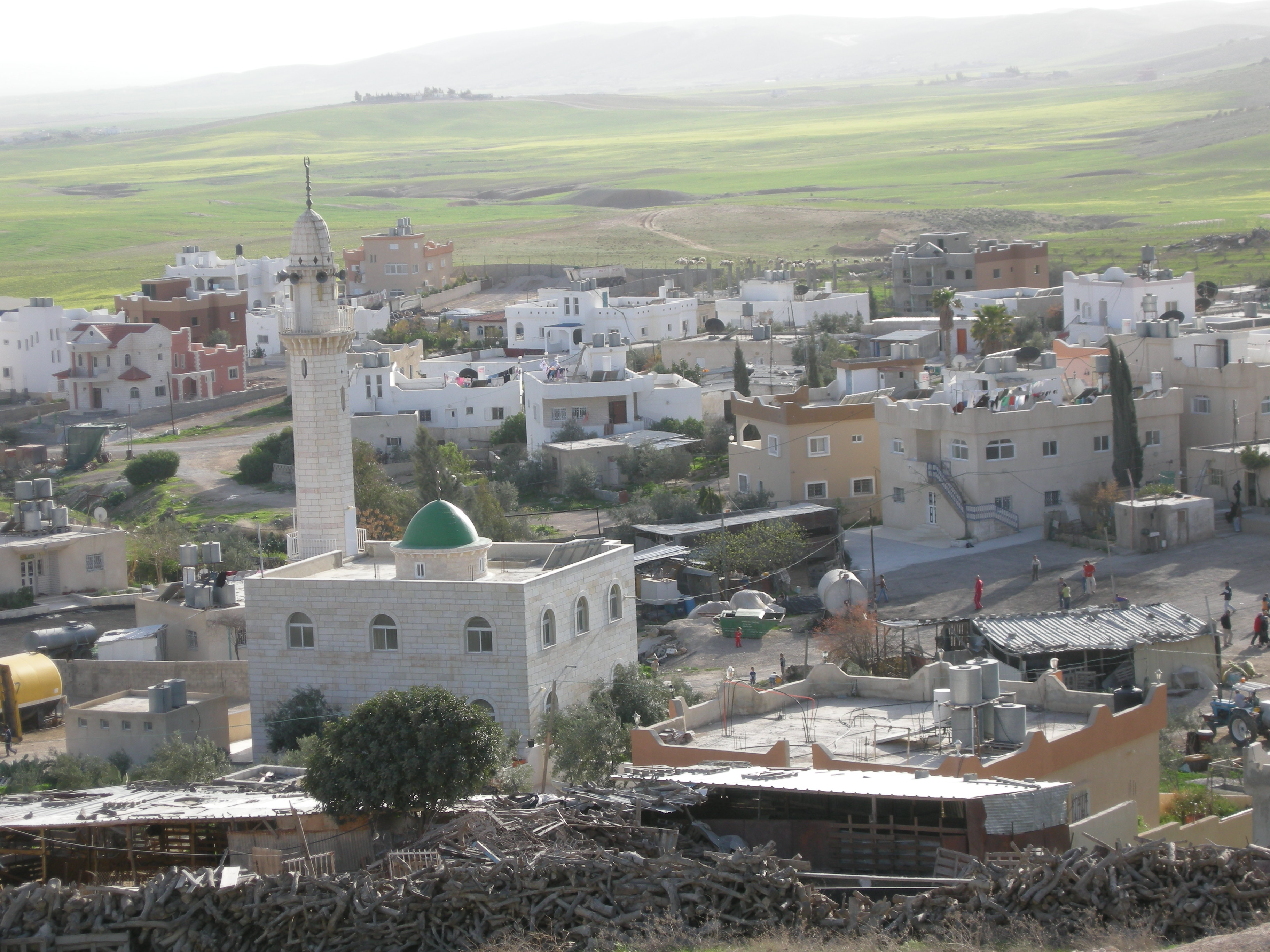 Photos from Drijat